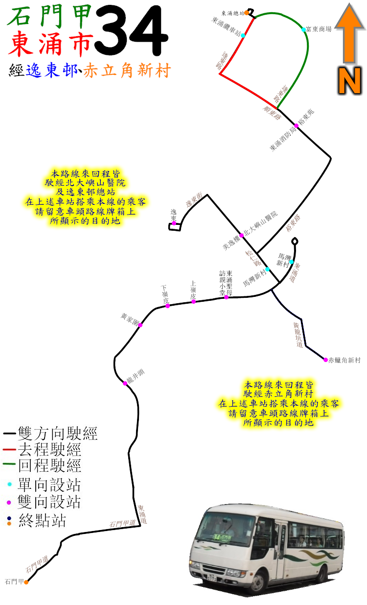 中文（香港）: 新大嶼山巴士34線的走線圖